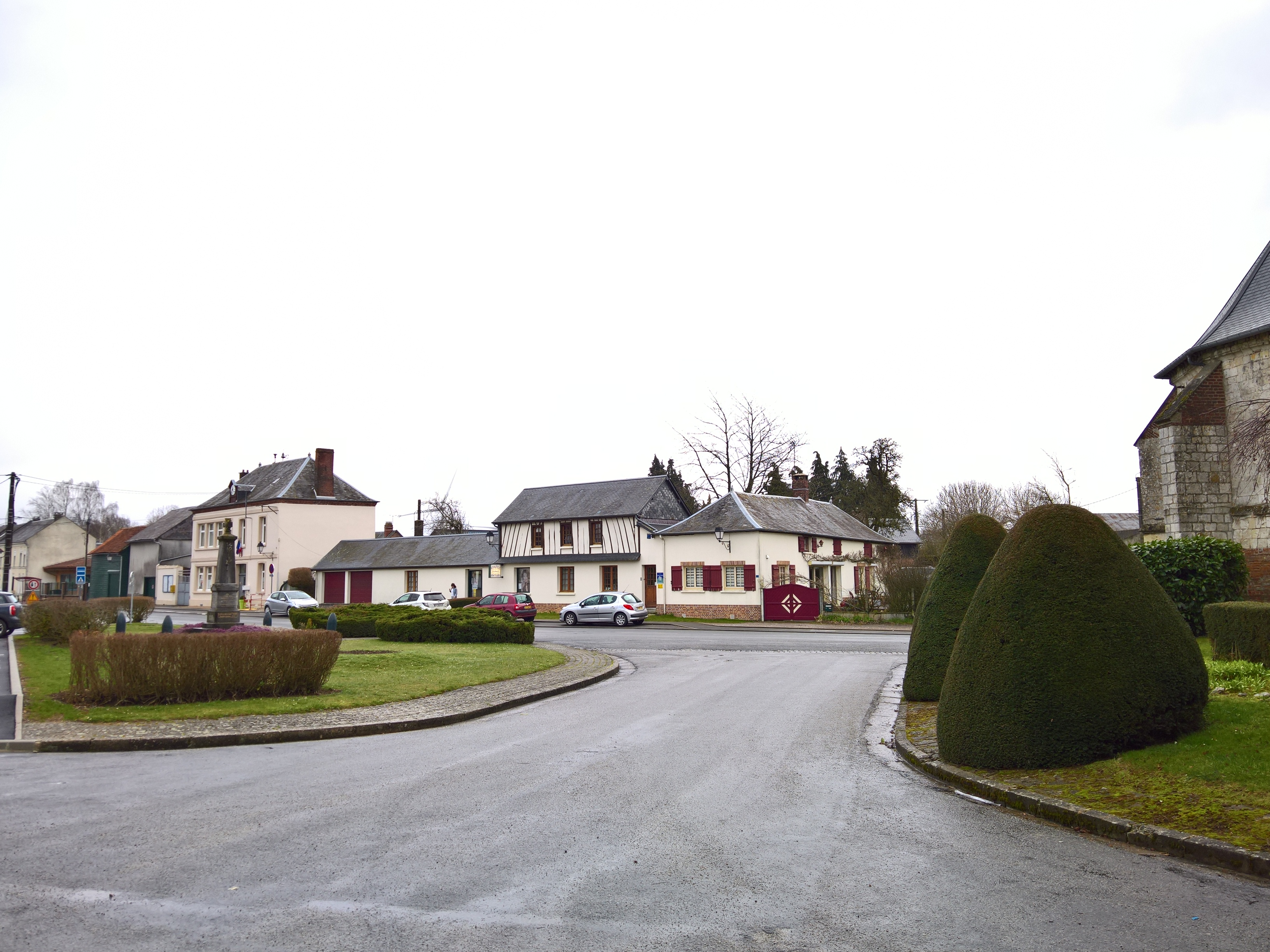 Croixrault : La place, vue depuis l'église